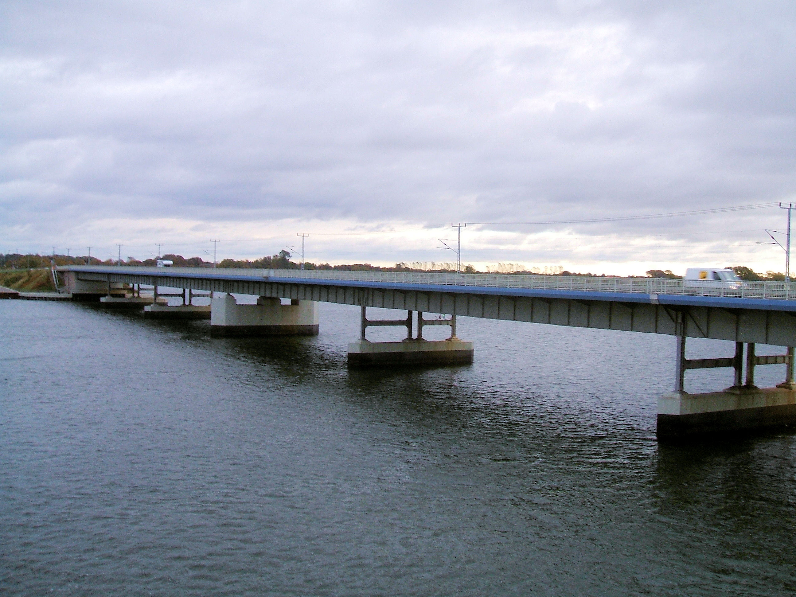 Rügendammbrücke